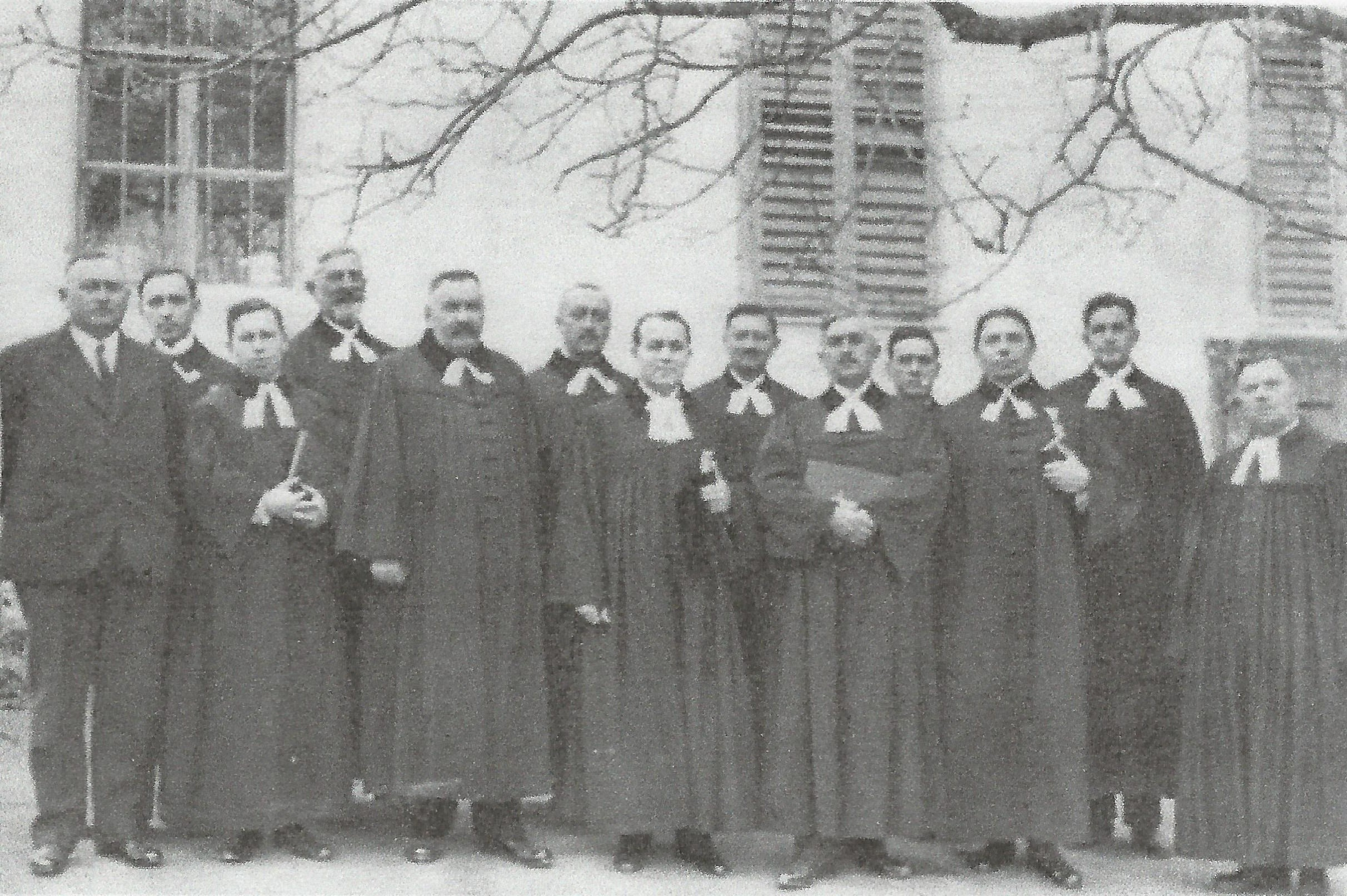 Evageličanski duhovniki Prekmurskega seniorata leta 1928 ob posvetitvi cerkve. Od leve proti desni: Josip Benko inšpektor, Leopold Hari, Aleksander Škilič, Karel Šiftar, Štefan Kovač senior, Aladar Darvaš, dr. Filip Popp škof, Geza Heimer, Štefan Godina, sledi neki učitelj, Adam Luthar, Karel Kovač, Henrik Goschenhoffer.